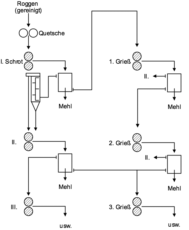 Vermahlungsdiagramm, milling diagram